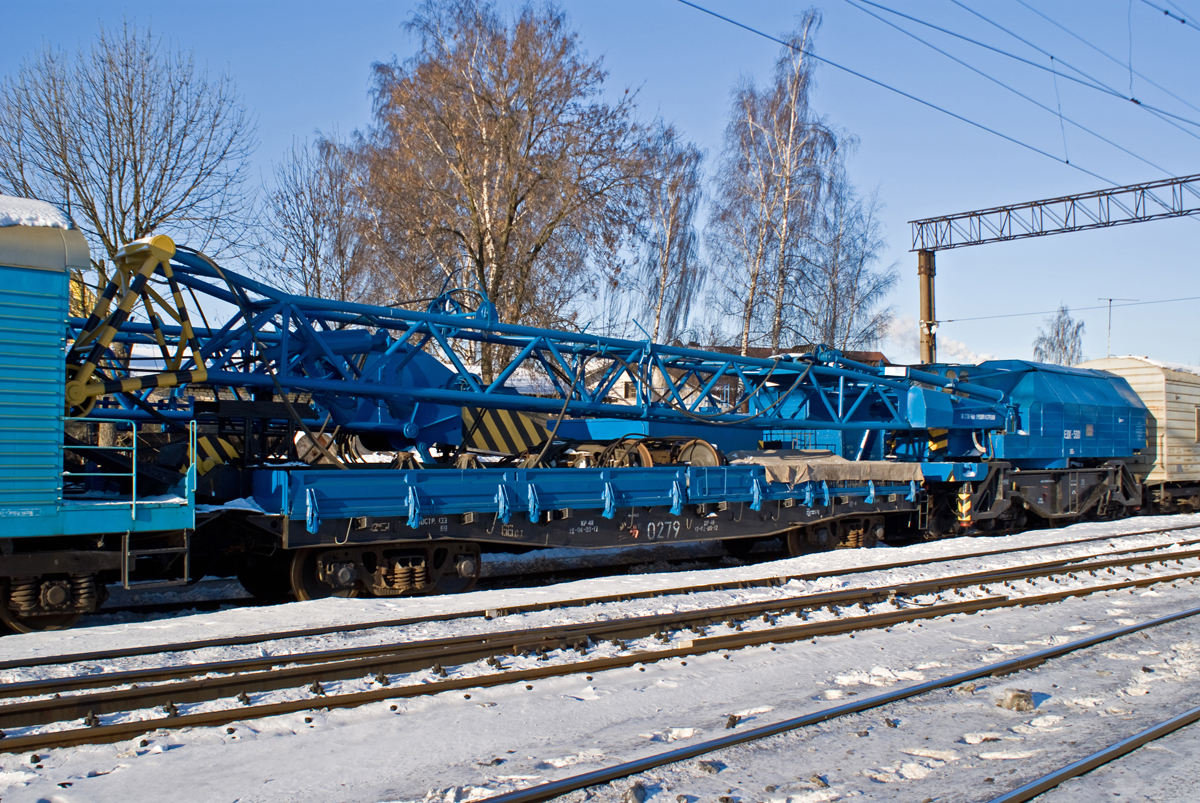 Железнодорожный кран ЕДК-500 (Беларусь, Минск, Институт-Культуры, 2010)